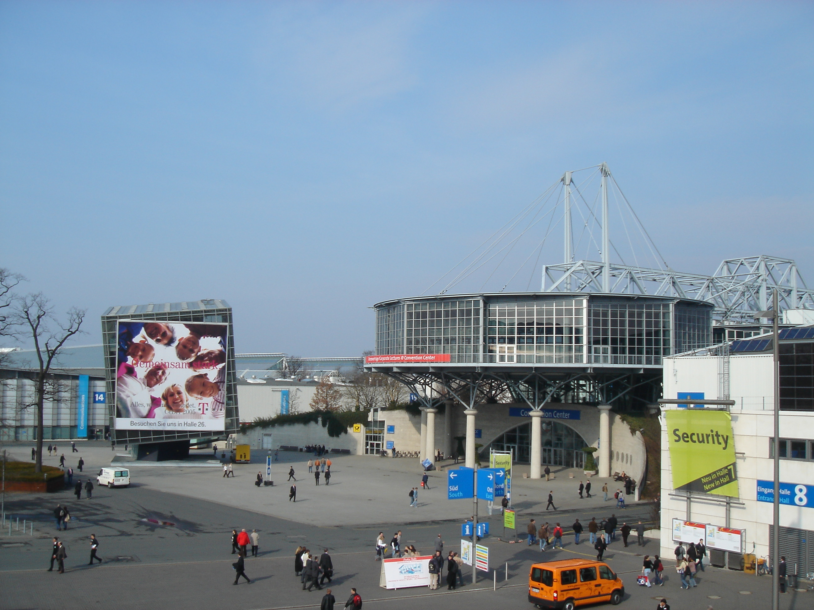 Cebit Ort: Computer- und Telekommunikationsmesse Cebit 2005, Hannover